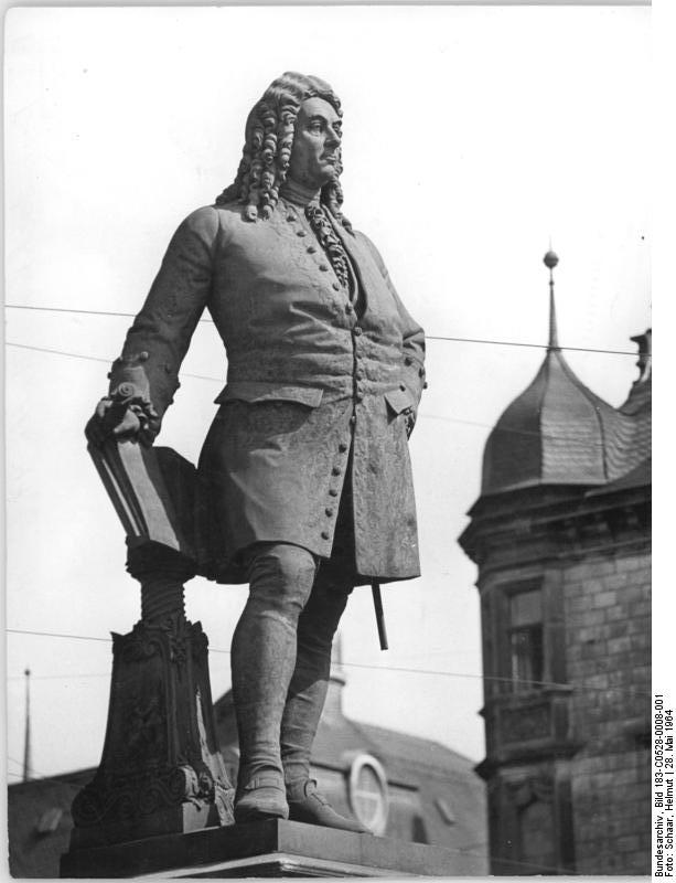 Halle, Händel-Denkmal Zentralbild Schaar Th-Qu 28.5.1964 Vorbereitung der Händel-Festspiele in Halle Vom 6. - 10. Juni 1964 werden in Halle-Saale die Händel-Festspiele veranstaltet. Hier ein Blick auf das Georg-Friedrich-Händel-Denkmal auf dem Marktplatz in Halle.